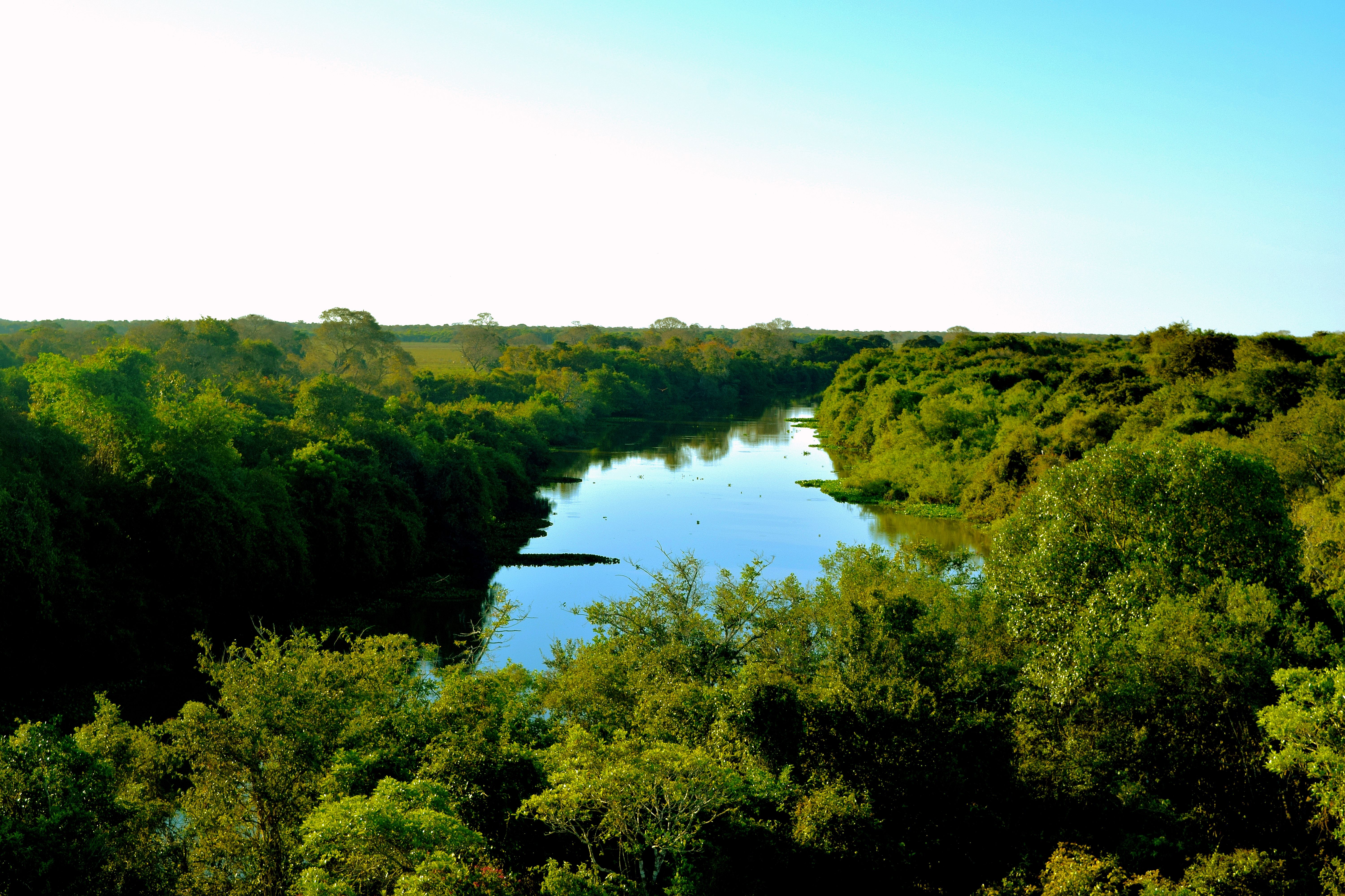 No meio do Pantanal encontrei um mirante pelo qual pude apreciar a paisagem por cima das árvores, é indescritível a sensação de alegria de ver tanta beleza.